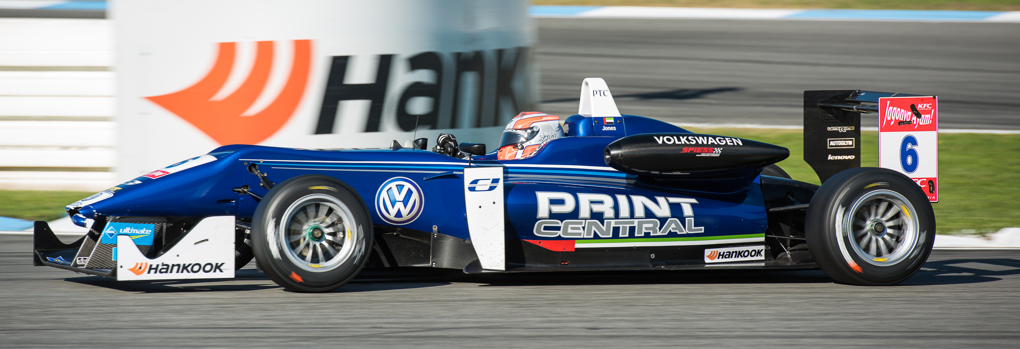 Carlin,DTM,Dallara F312,Deutsche Tourenwagen Masters,Edward Jones,F3 FIA European Championship,FIA Formel 3 Europameisterschaft,Hockenheimring,Motorsport,Volkswagen